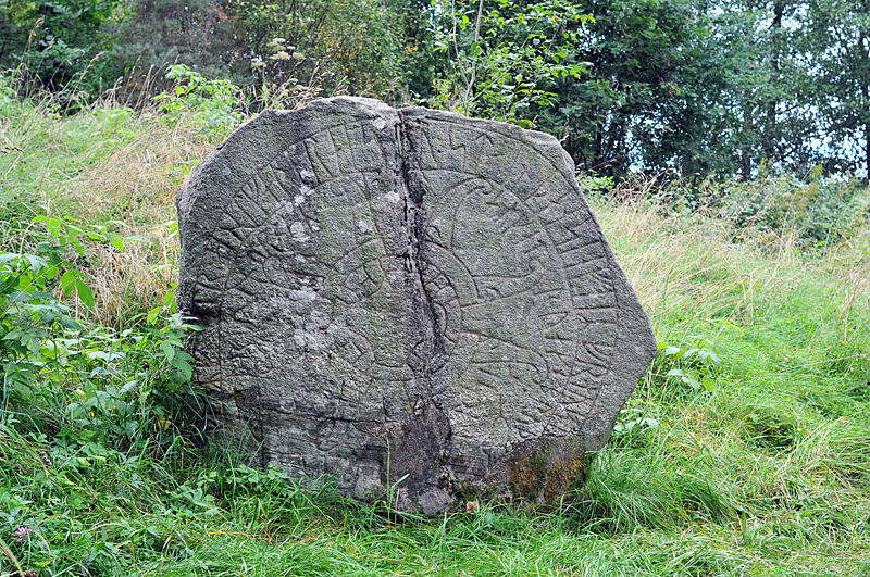 Runsten SÖ 45, Nyköping 5:3, vid Släbro i Nyköpings kommun